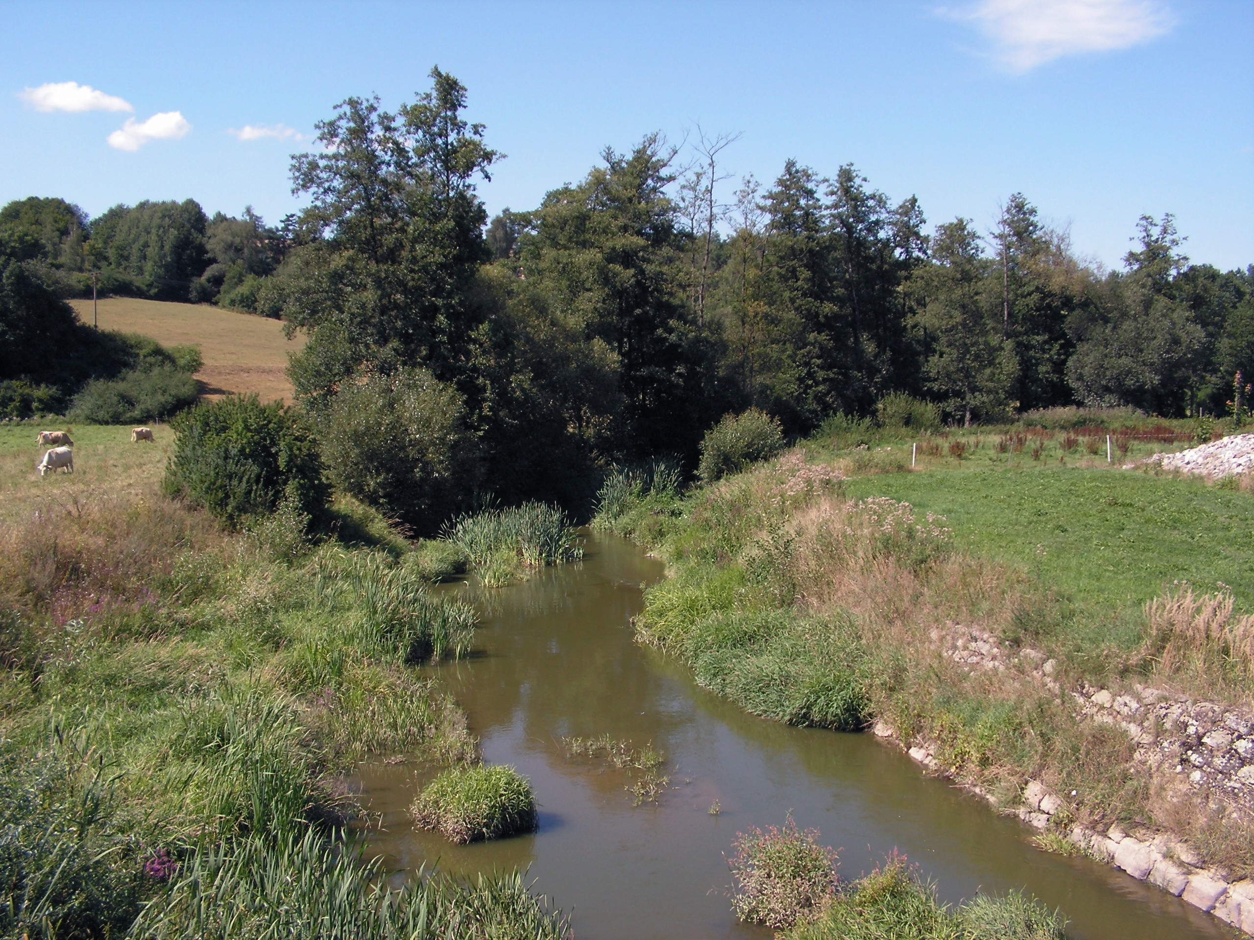 Vlašimská Blanice u Louňovic pod Blaníkem v okrese Benešov